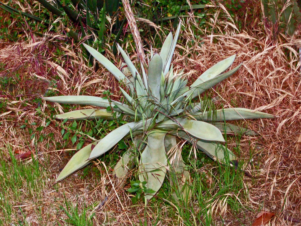 Agave guiengola at the botanical garden of Villa Durazzo-Pallavicini, Genova Pegli